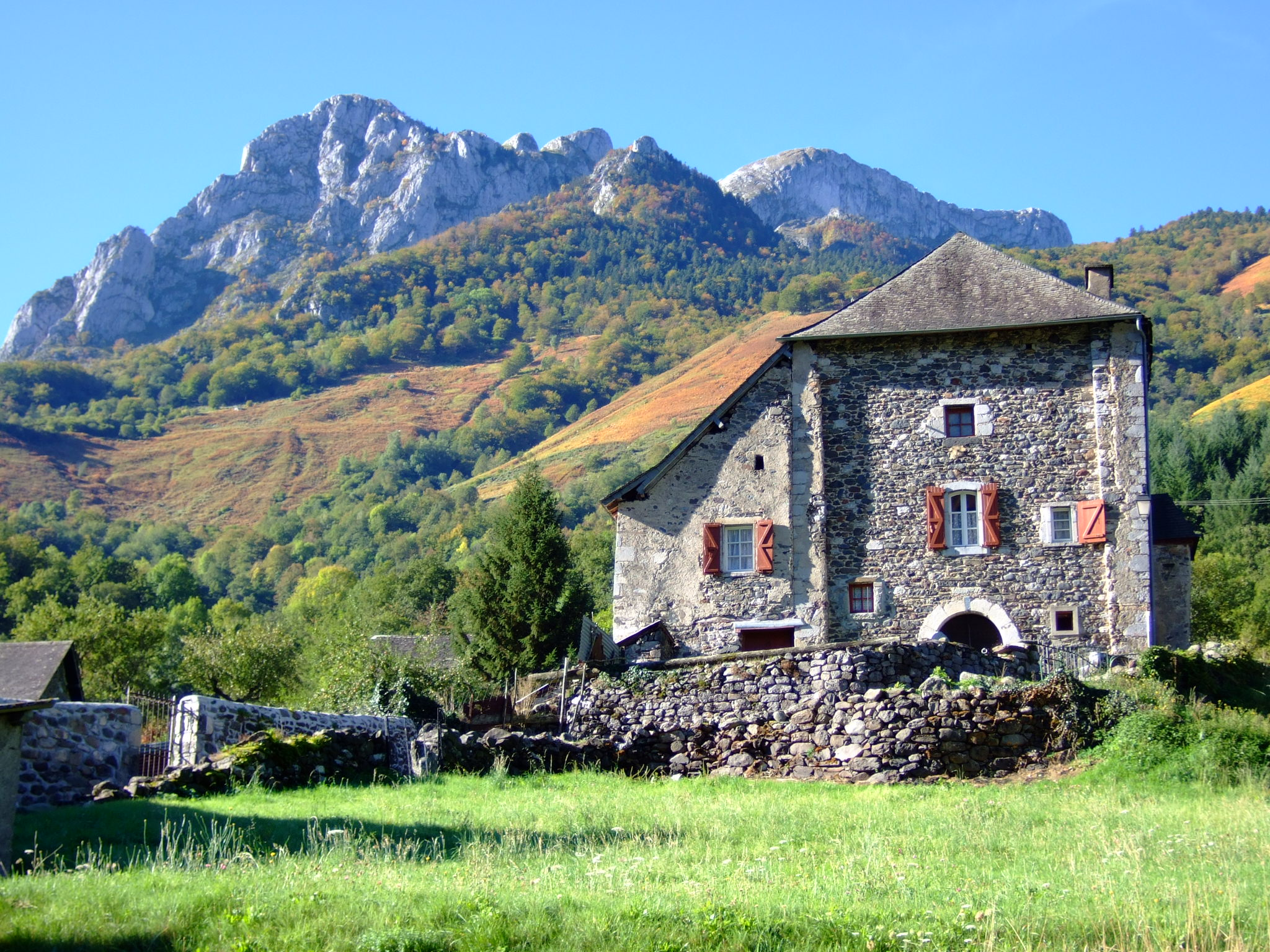 Maison forte à Borce (Pyrénées-Atlantiques, France).